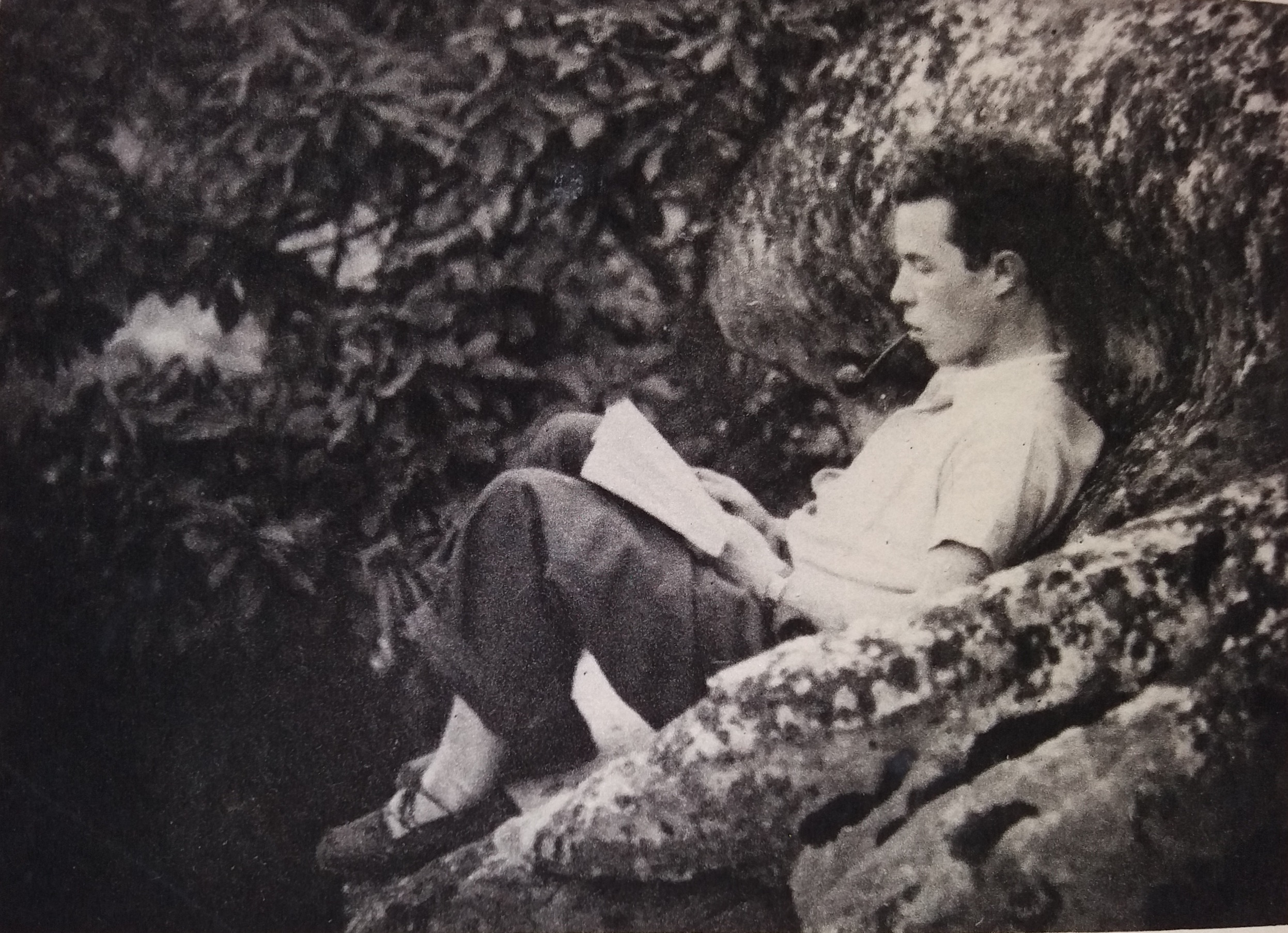 Photographie de Jean Turlais (1922-1945), poète et écrivain français.